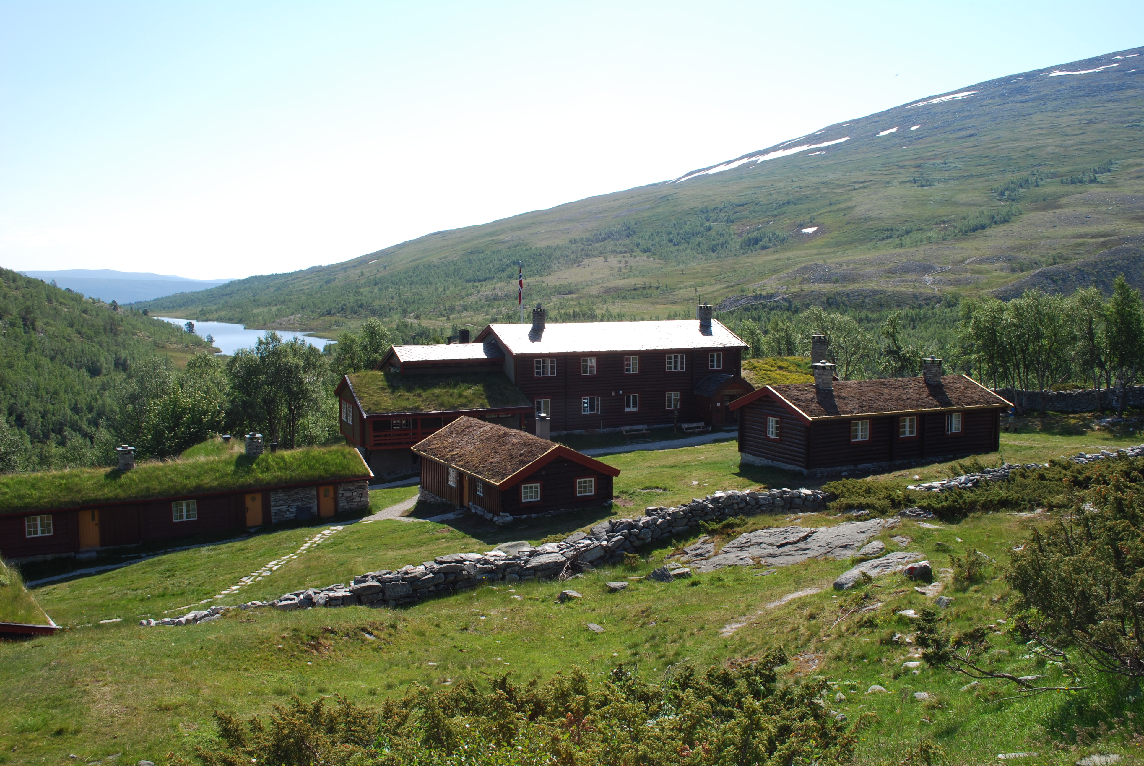 Bjørnhollia turisthytte øst i Rondane i Oppland fylke.